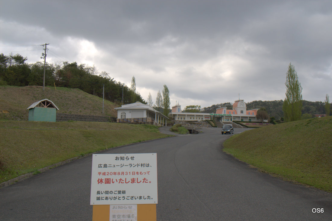 広島県安芸高田市の旧広島ニュージーランド村。